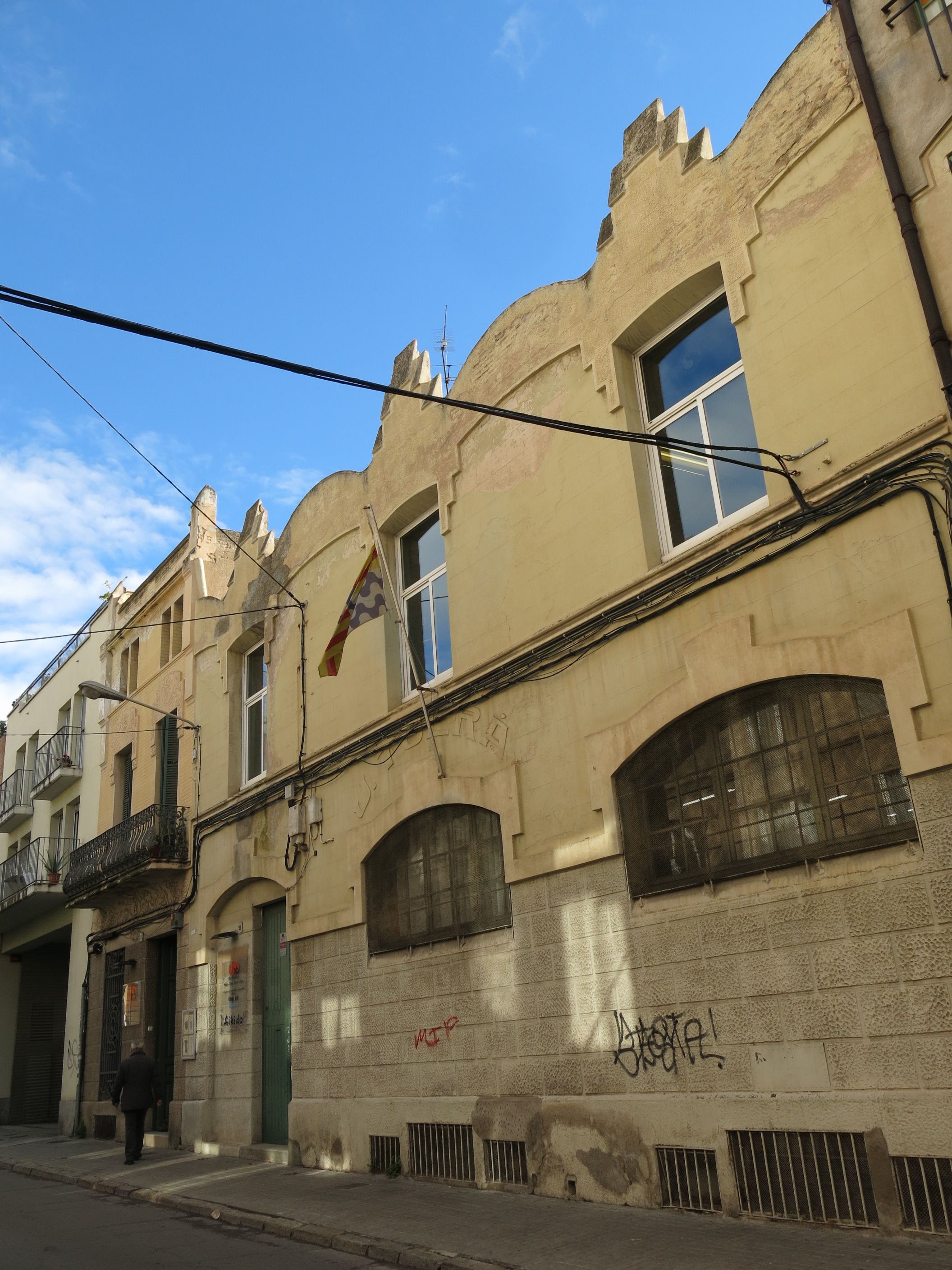 Casa i taller Joan Tolrà (Badalona)